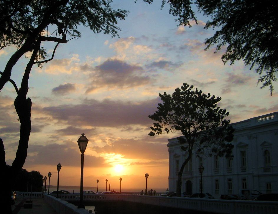 São Luís, MA: conjunto arquitetônico e paisagístico; Pôr do Sol em frente ao Palácio dos Leões